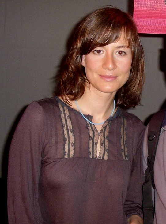 Maja Ostaszewska (ur. 3 września 1972 w Krakowie) - polska aktorka teatralna i filmowa